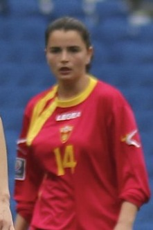 Jasna Djoković of Montenegro